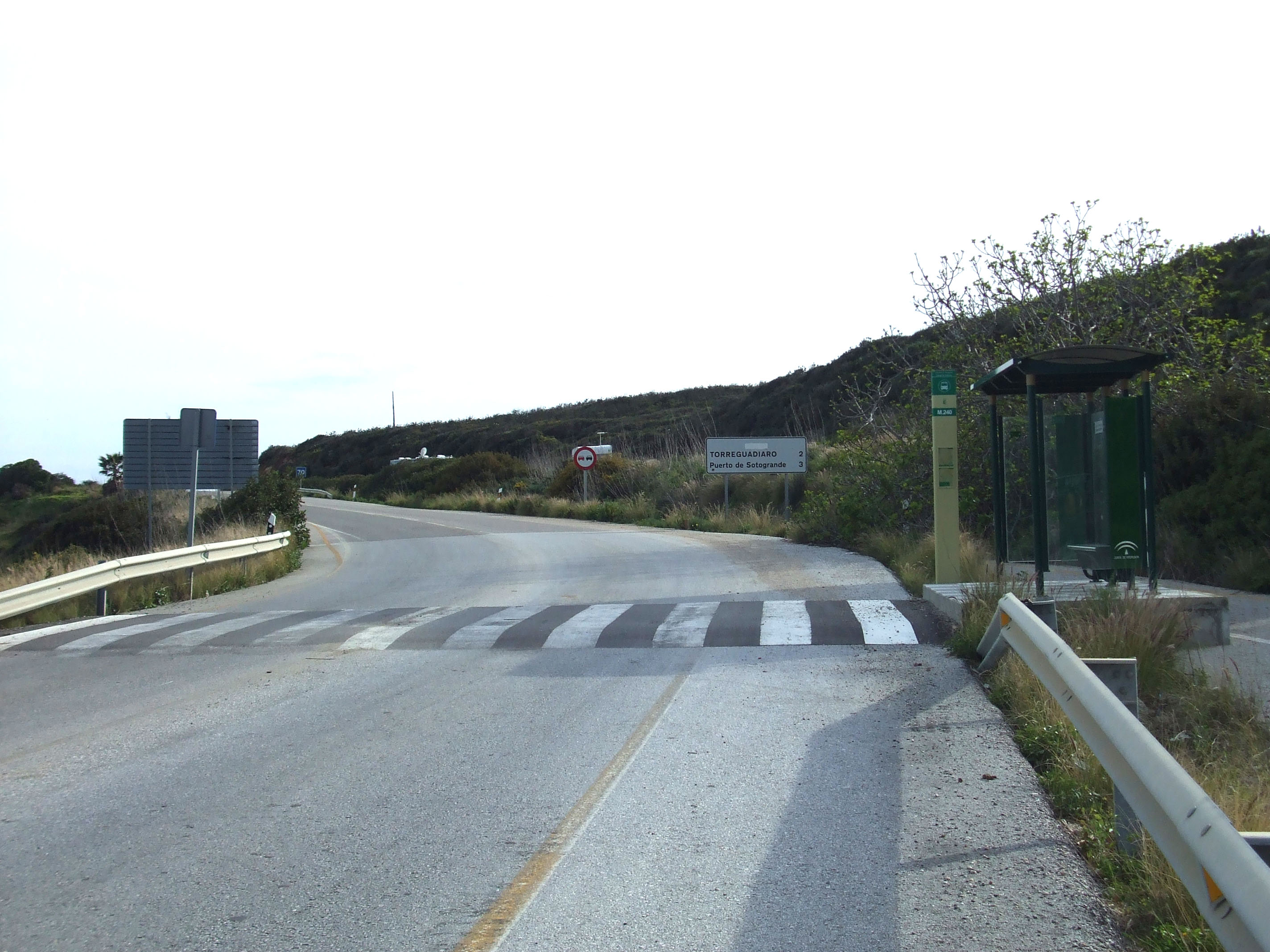 Carretera N-340 a su paso por Cala Sardina, Torreguadiaro, San Roque; y parada de autobús.